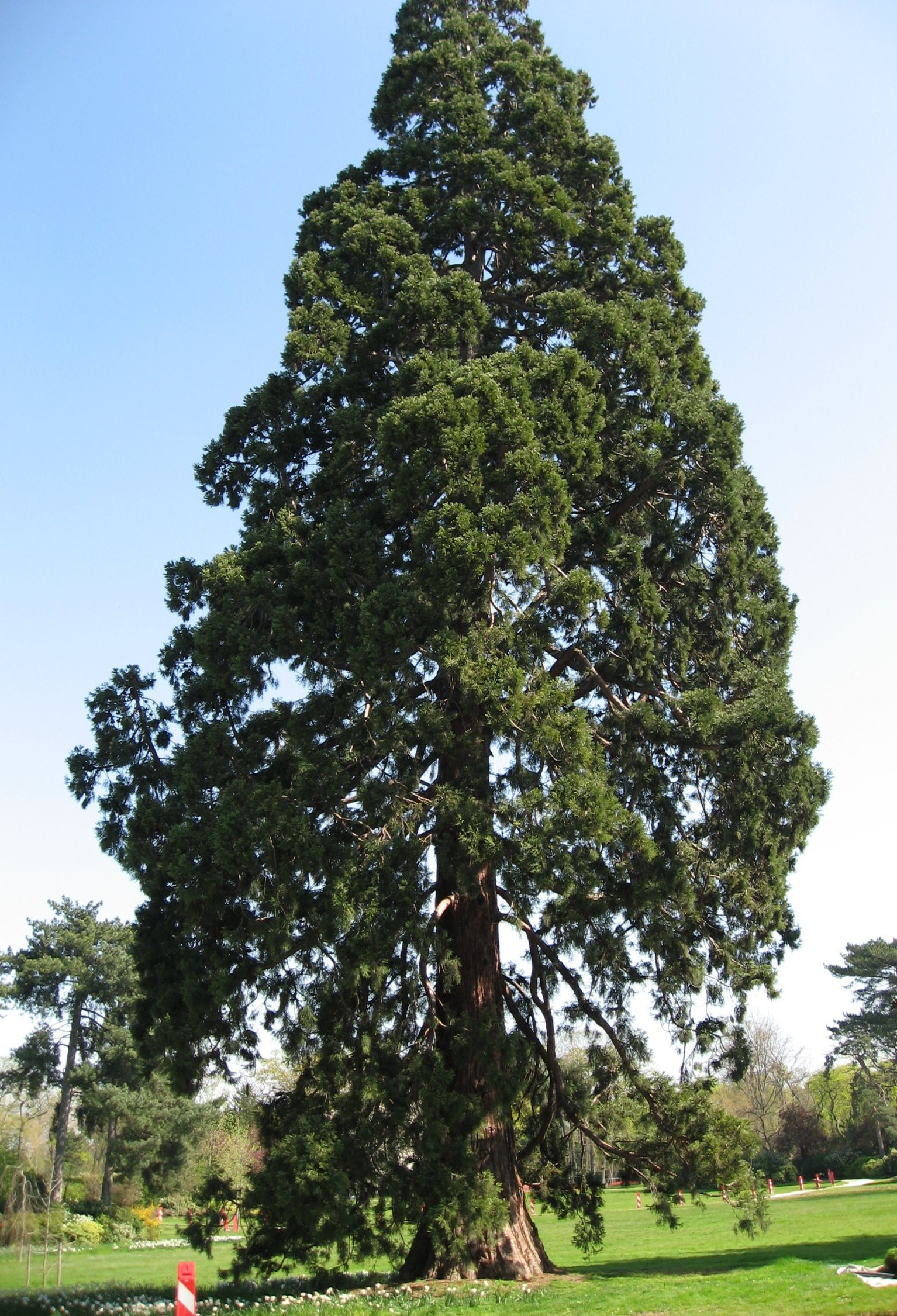 Sequoiadendron giganteum in Jardin du Pré-Catelan Map: 48° 51' 53" N 2° 15' 10" E